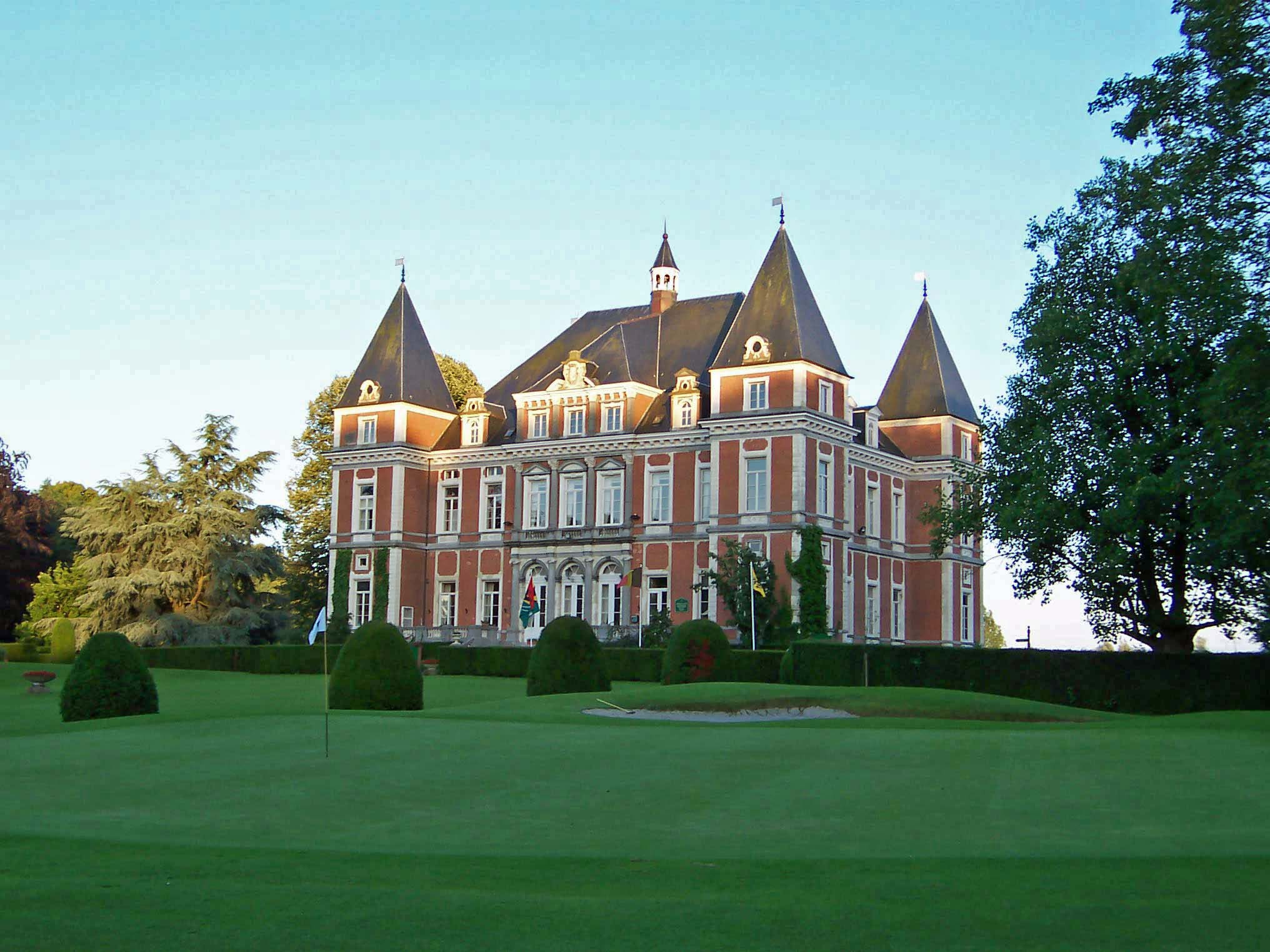 Golf d'Oudenaarde